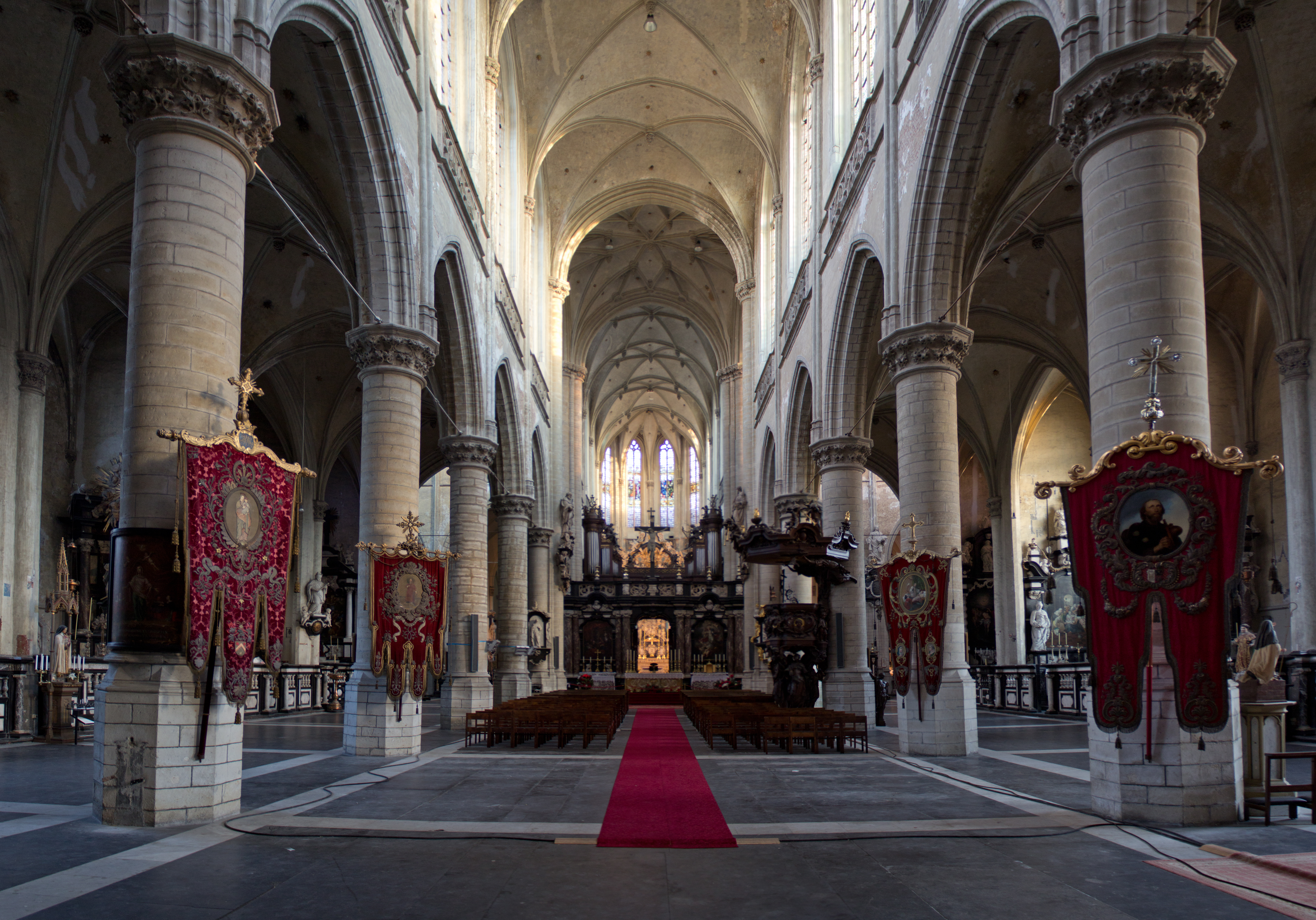 Parochiekerk Sint-Jacob, Antwerpen